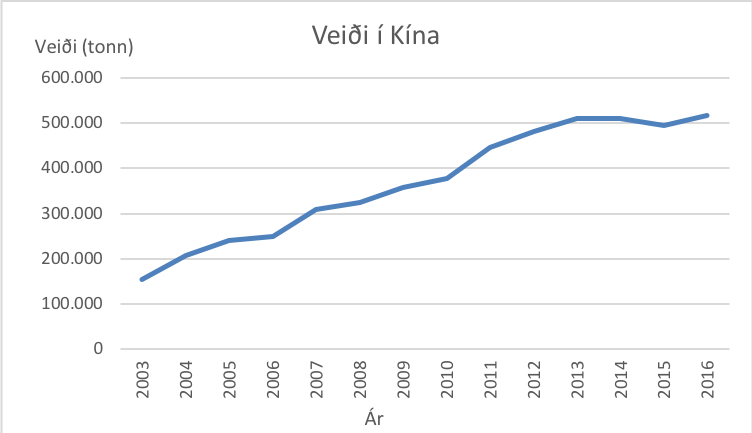 Veiði á norðlægum snákshaus í Kína